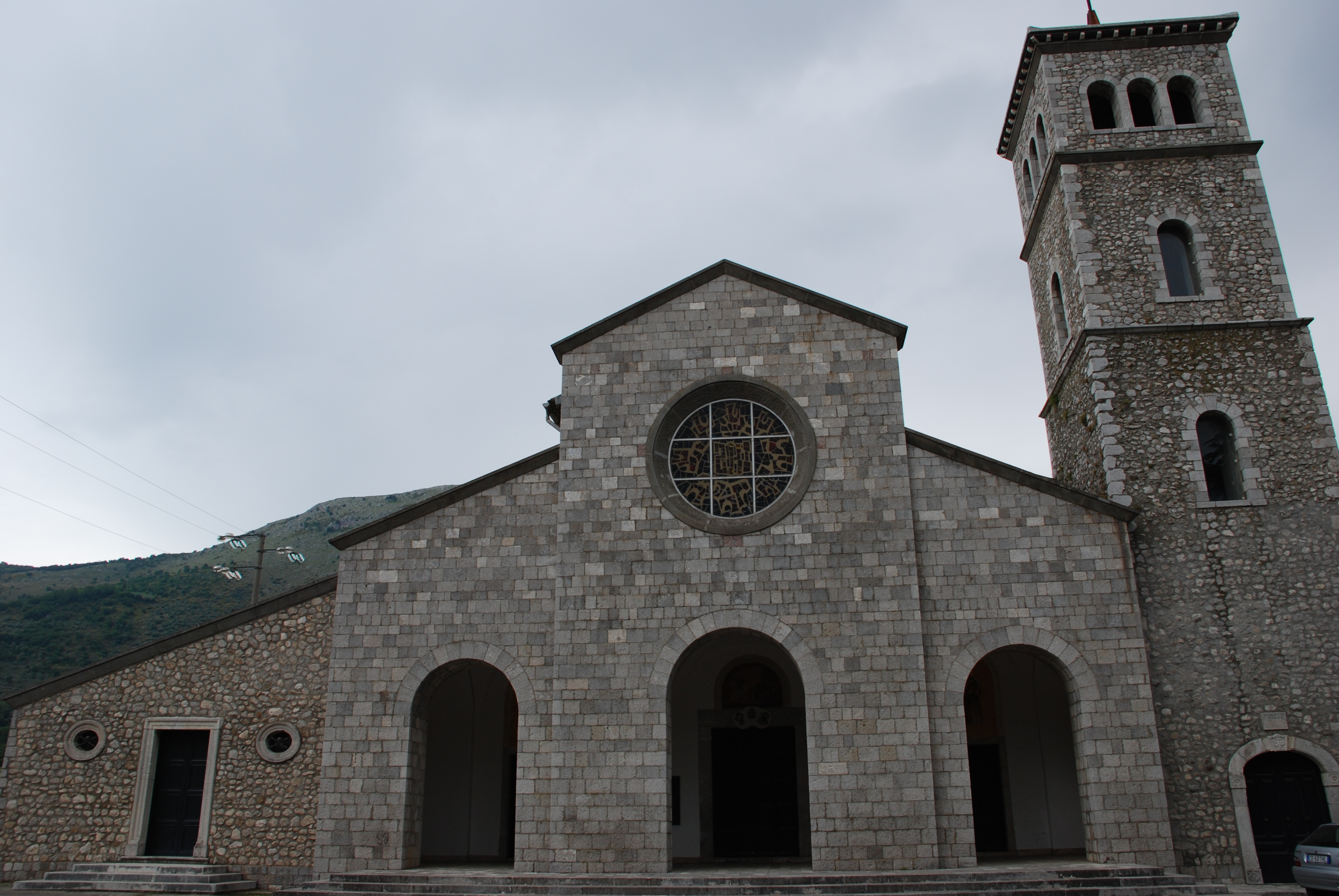 Facciata della Basilica della SS. Annunziata, chiamata volgarmente anche chiesa di Sant'Antonio, a Vitulano (BN).